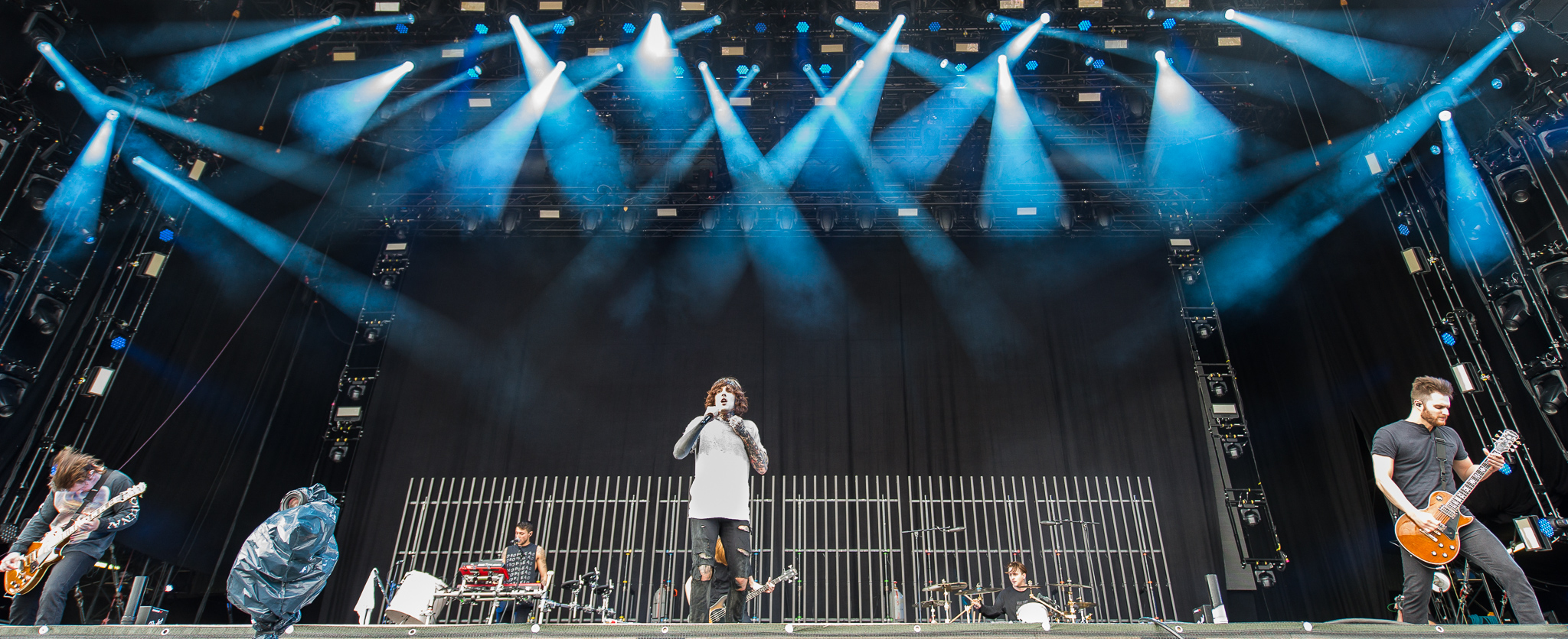 ARGO-Konzerte,Bring Me The Horizon,Festival,John Jones,Jordan Fish,Konzert,Lee Malia,Livekonzert,Livemusik,Matt Kean,Matt Nicholls,Musik,Oliver Scott Sykes,RiP,Rock im Park 2016,Seat Zeppelin Stage